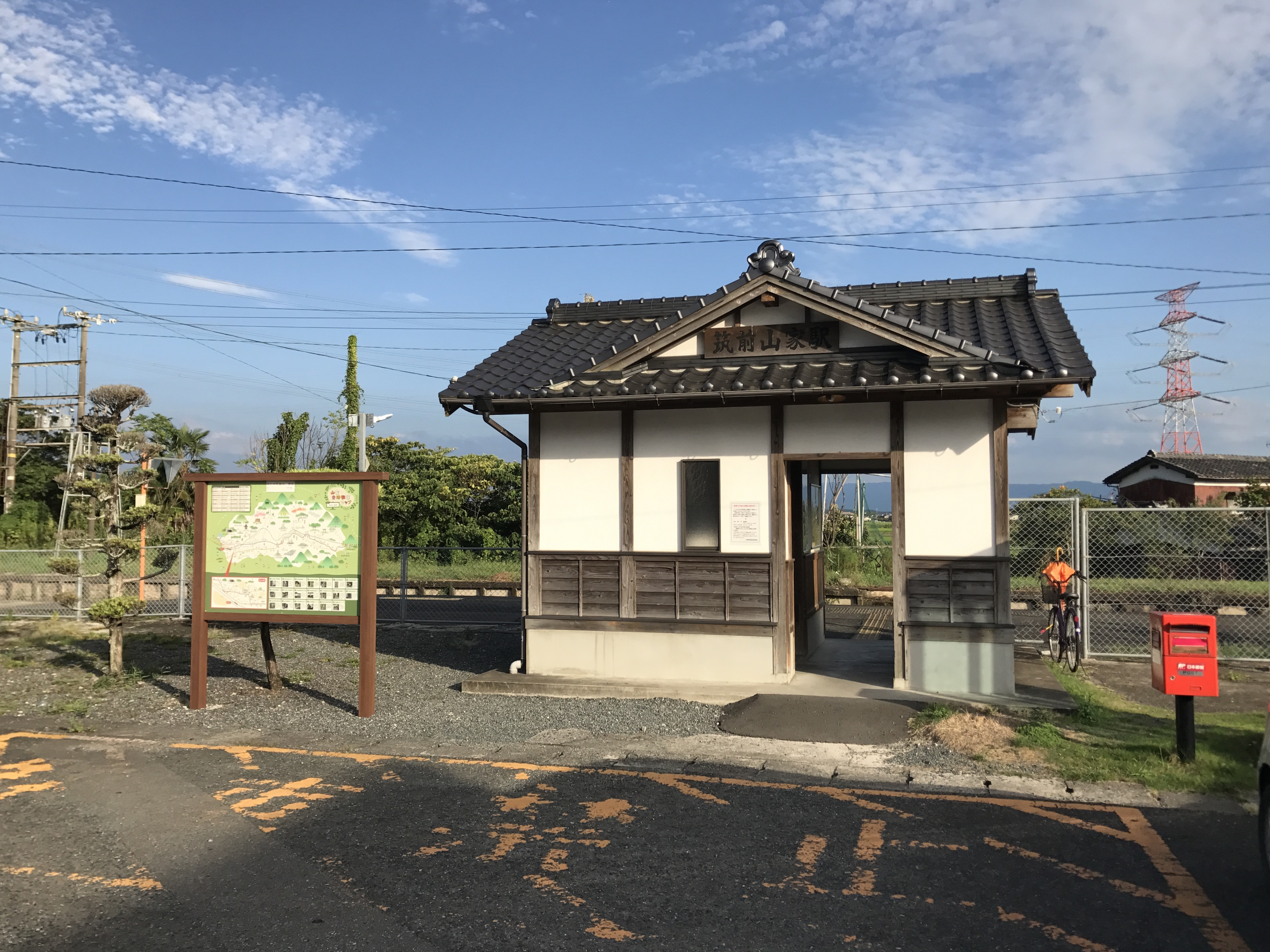 筑前山家駅駅舎